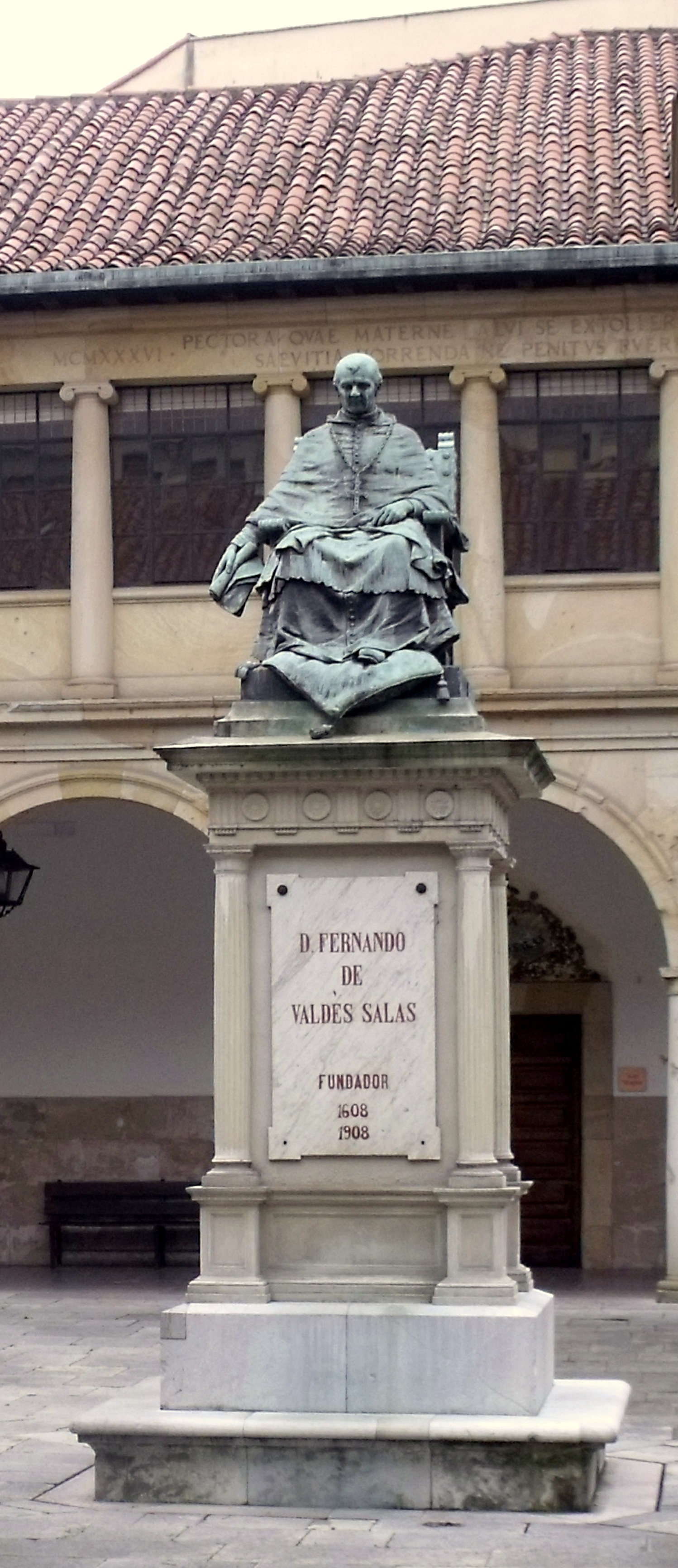 Escultura de Cipriano Folgueras Doiztúa